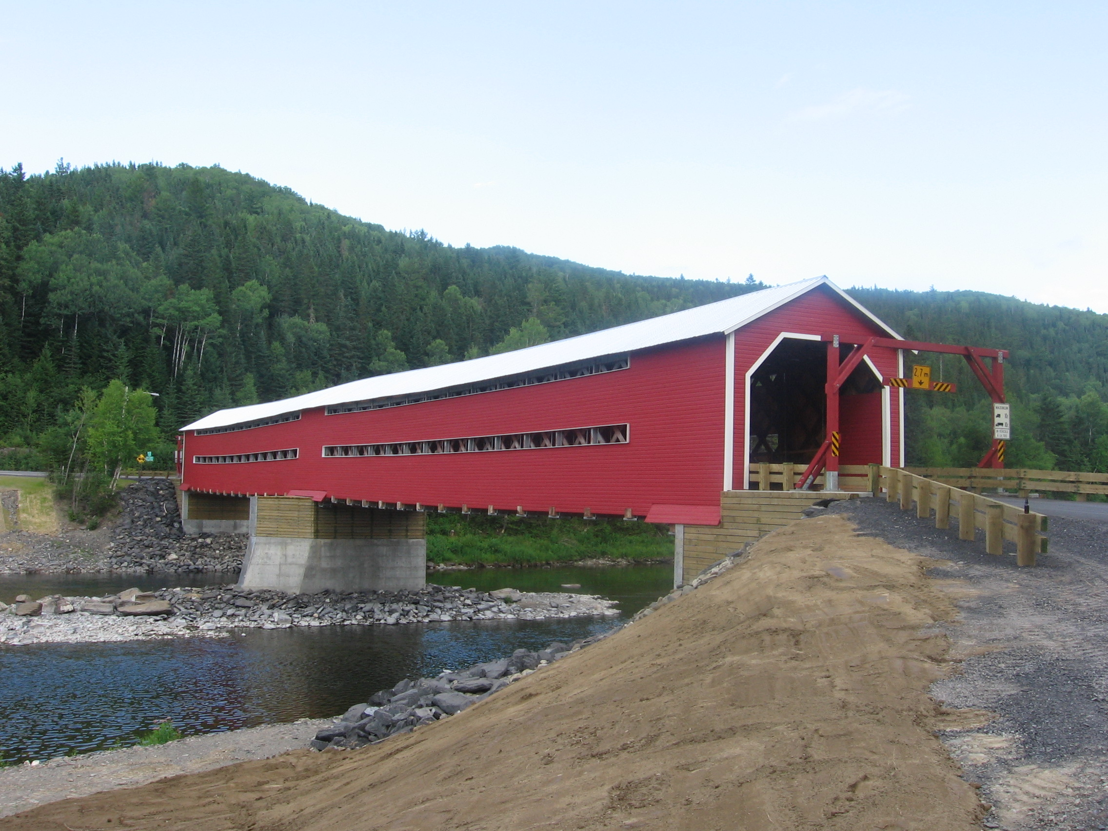 Pont couvert de Routhierville